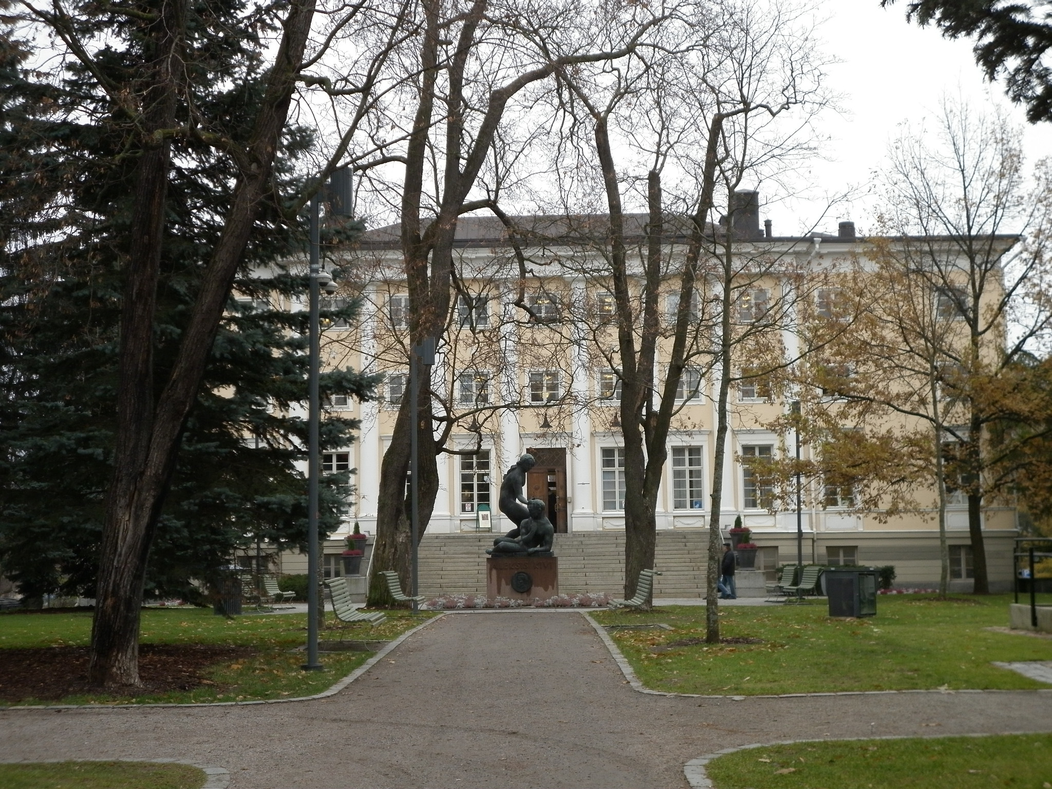 Vanha kirjasto puiden takaa